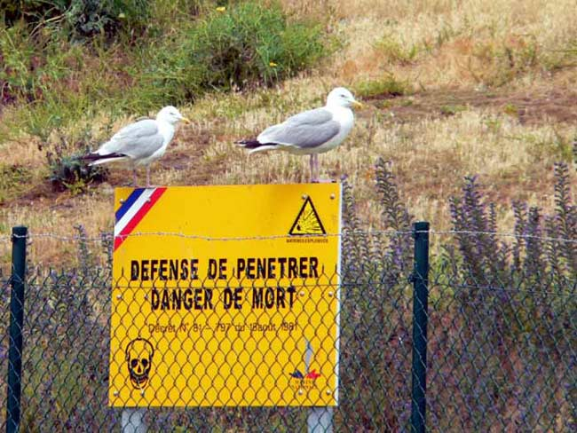 les goélands se moquent des interdictions sur l'île de Cézembre ....